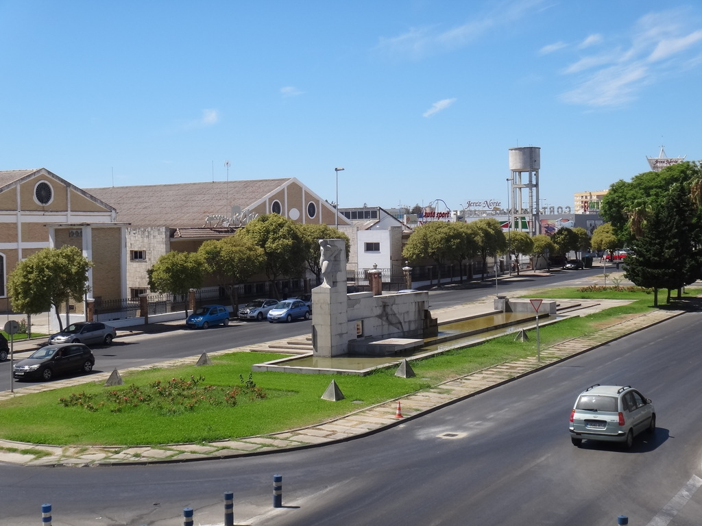 Monumento a la vendimia (monumento al Arrumbador de Francisco Pinto Berraquero) en Jerez de la Frontera (Andalucía, España)